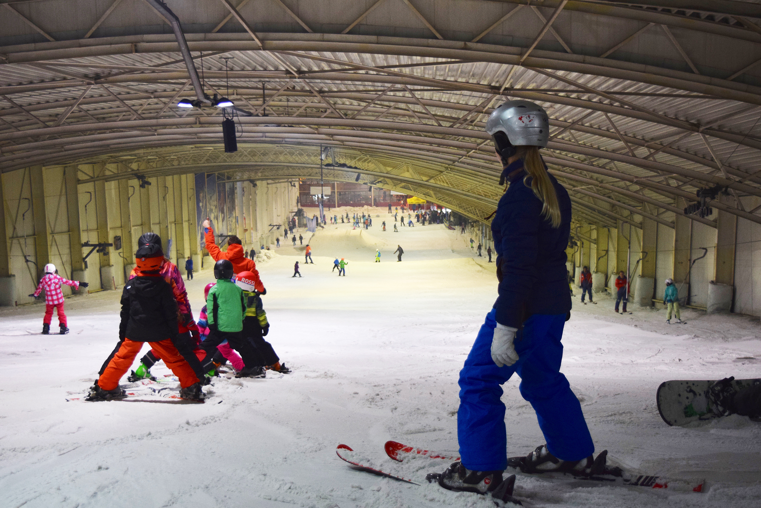 De 230 meter lange piste.